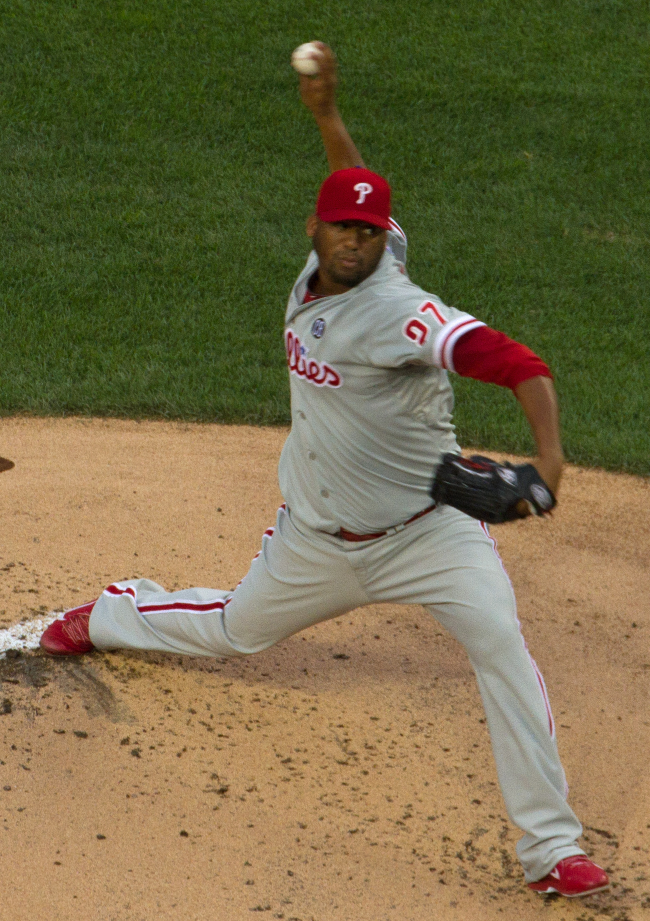 Roberto Hernández